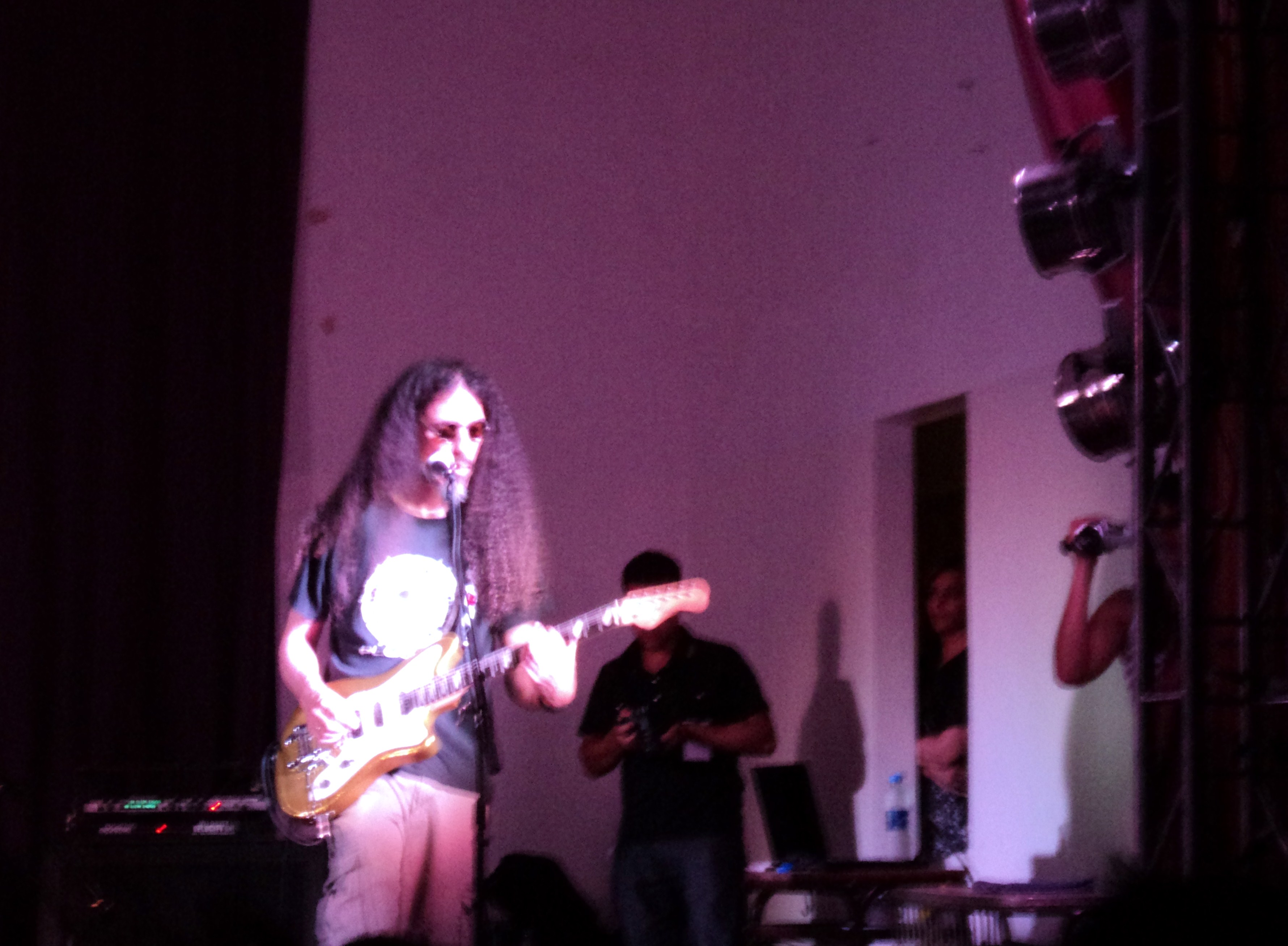 el guitarrista de la banda rescate